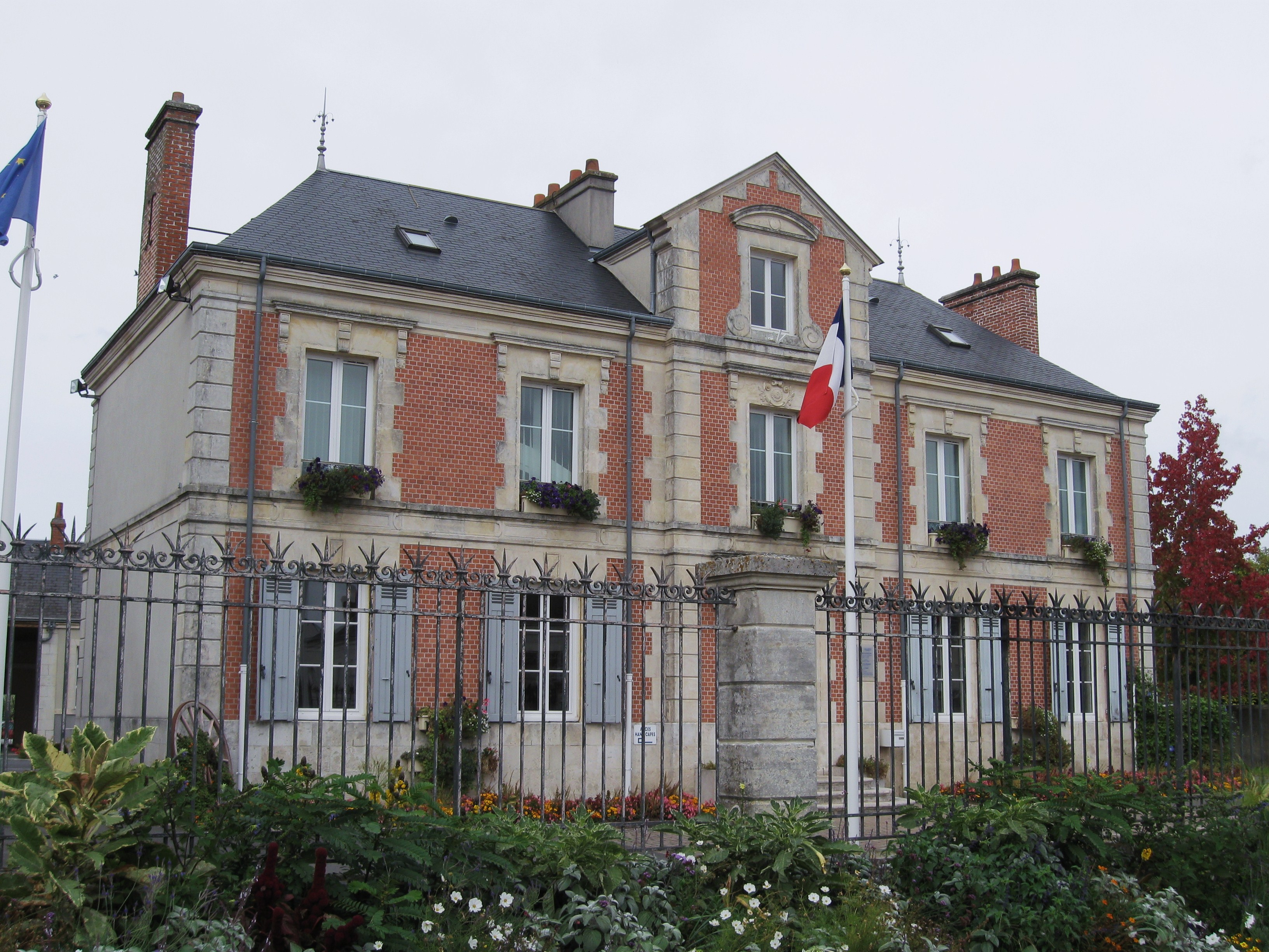 Mairie, Ingré, Loiret, France